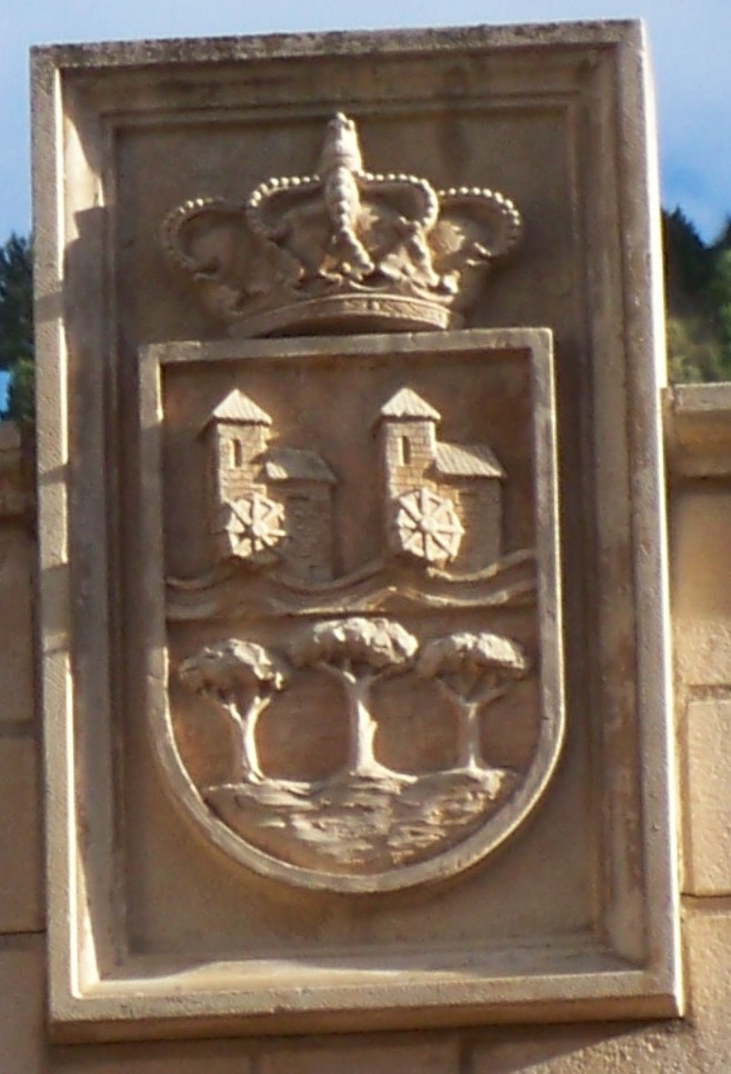 Placa con el escudo de Molinicos situada en la fachada principal de la Casa de la Cultura de Molinicos (Albacete)